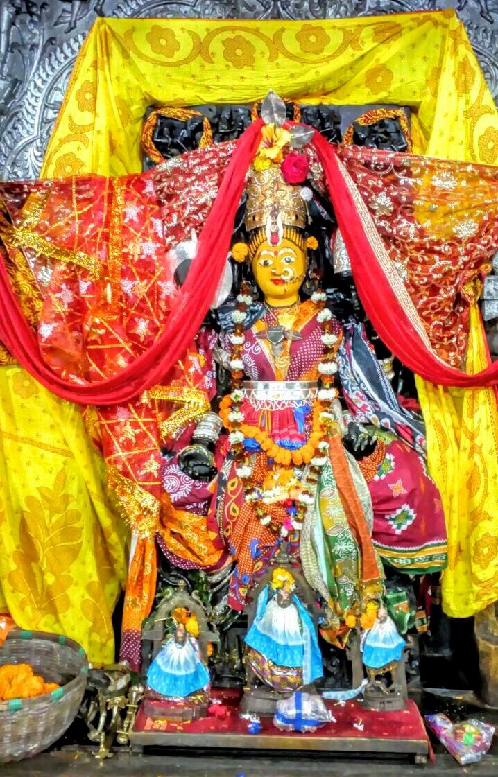 ଓଡ଼ିଆ: ଦୟାମୟି ମା ମଙ୍ଗଳା